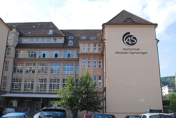 Hochschule Albstadt-Sigmaringen Standort Albstadt, Poststraße 6, Gebäude Haux